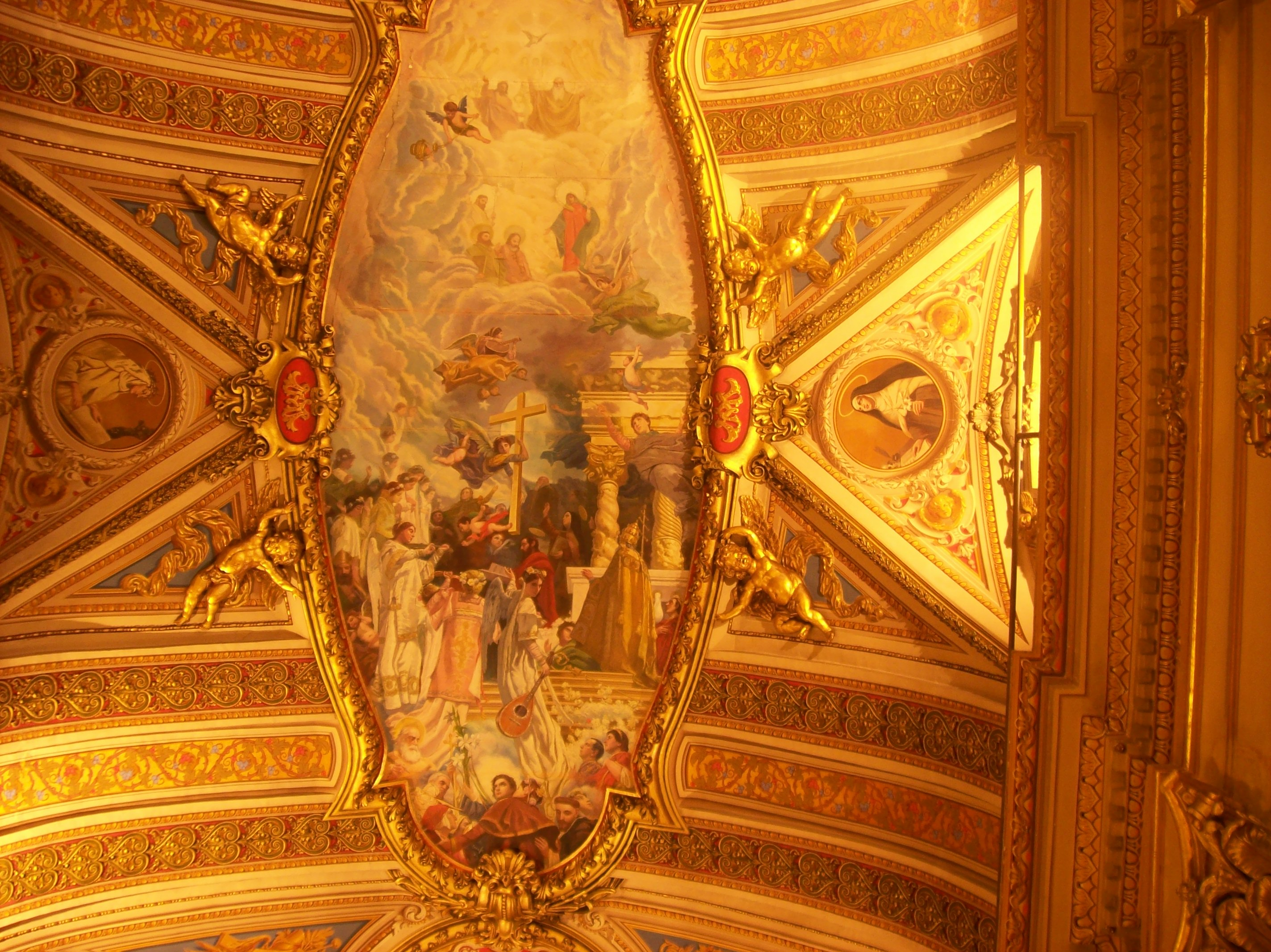 Detalle de las pinturas en el techo de la Catedral de Córdoba, Argentina.